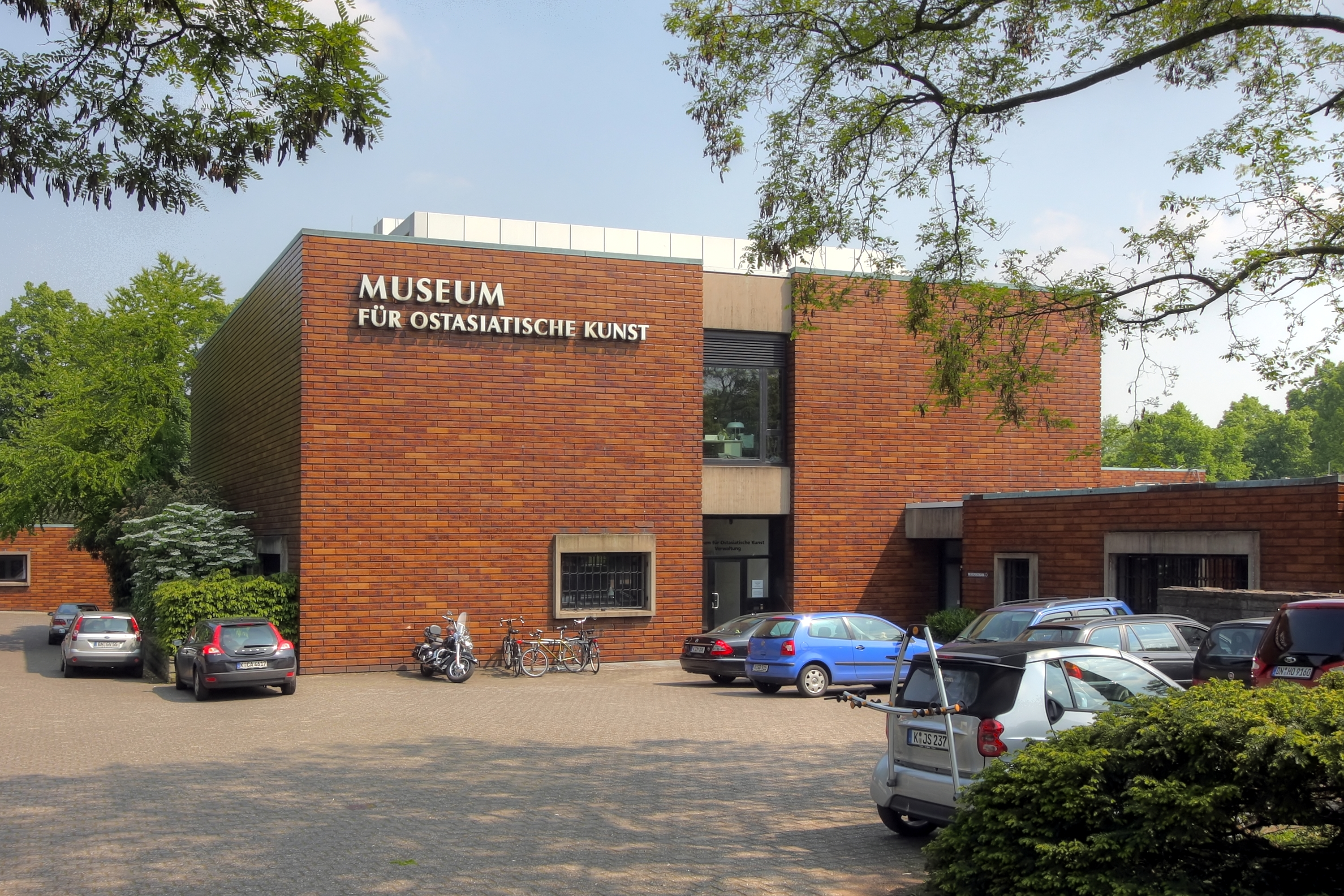 Museum für Ostasiatische Kunst, Köln. Verwaltungsgebäude und Parkplatz. Architekt: Kunio Maekawa